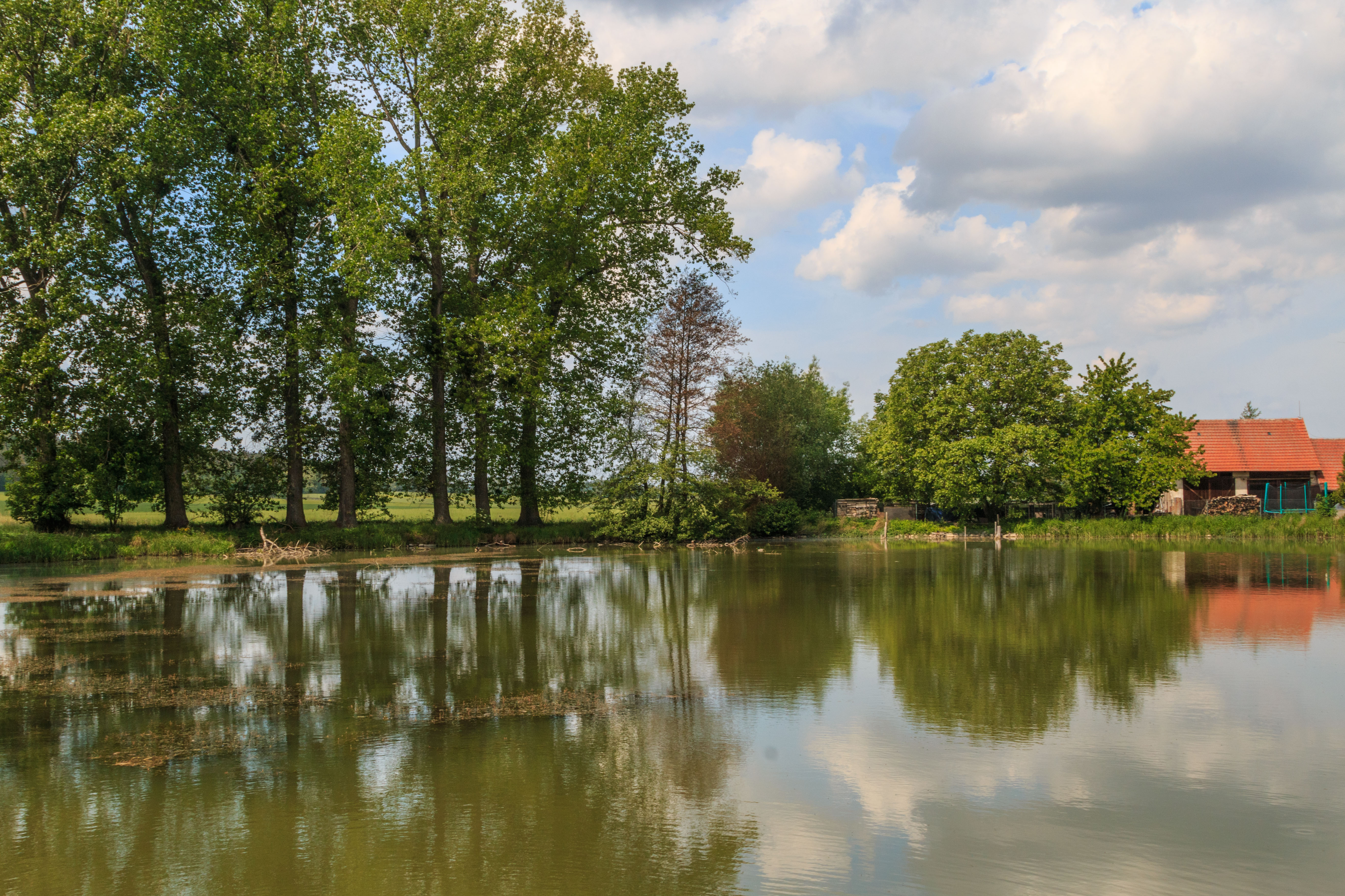 Šancův rybník v Kozašicích